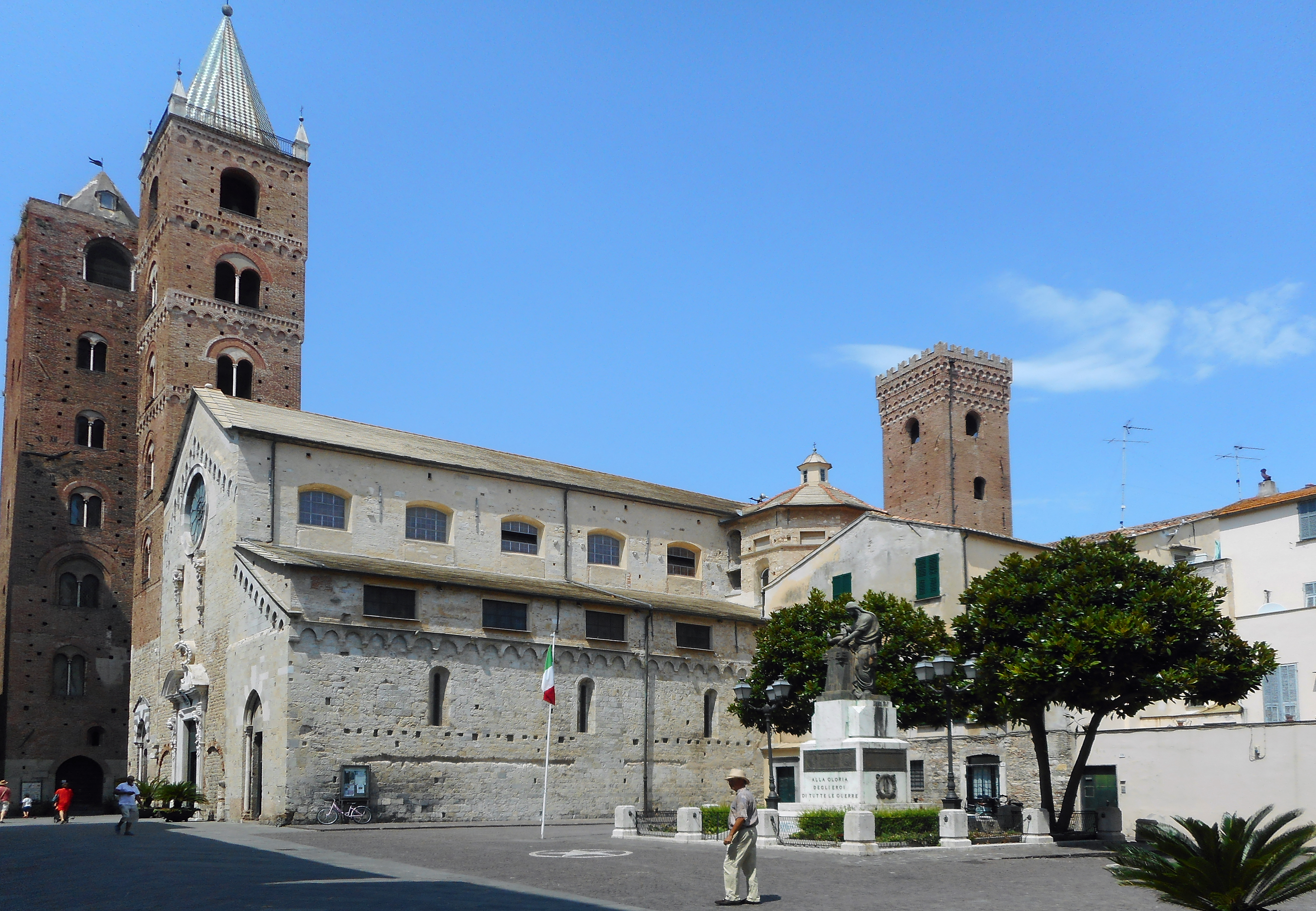 Albenga - Kathedrale San Michele_Arcangelo - Vorplatz.